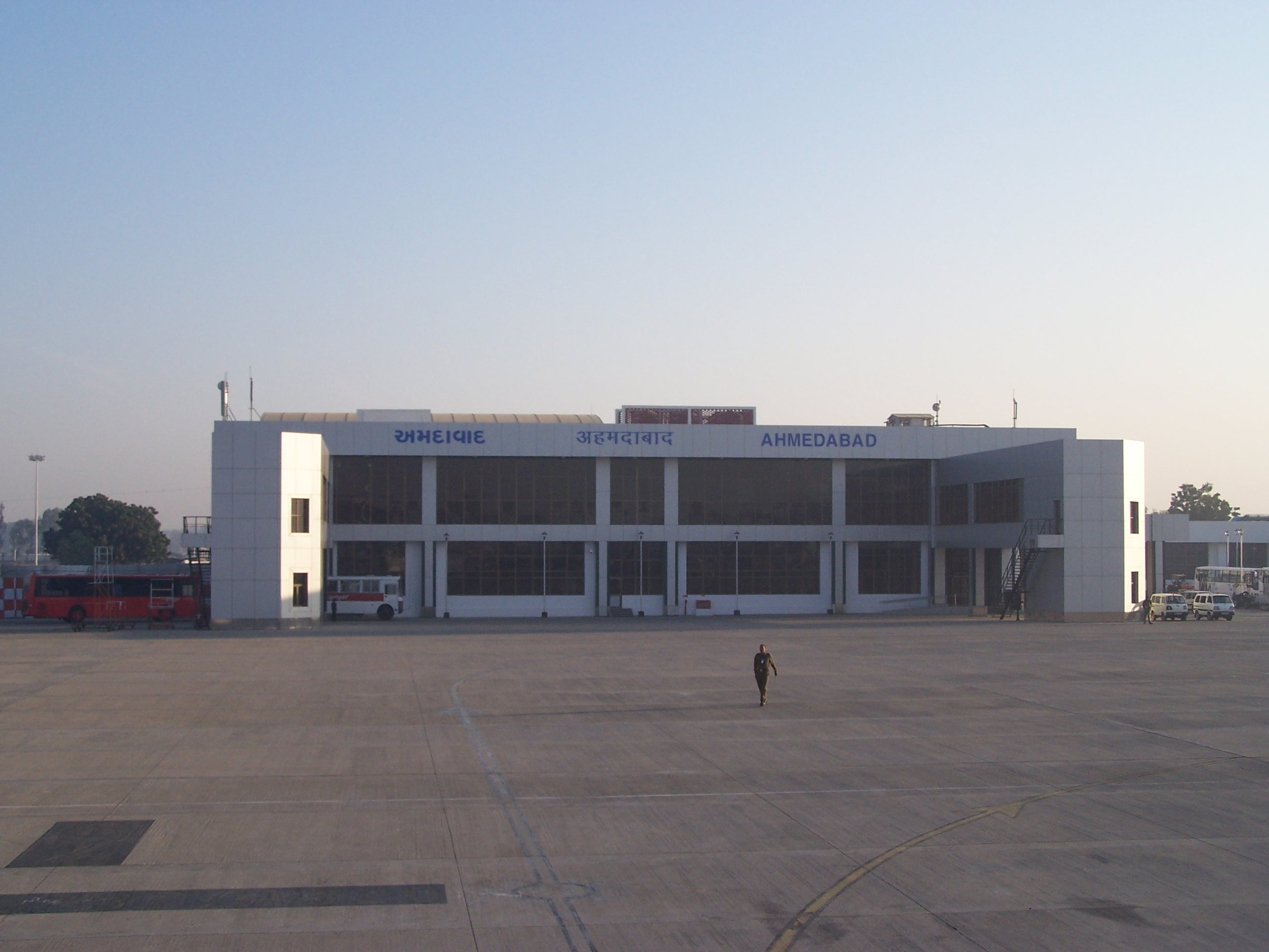 Terminal at Sardar Vallabhbhai Patel International Airport, Ahmedabad, Gujarat, India. Photograph taken December 2005 by SK Desai.